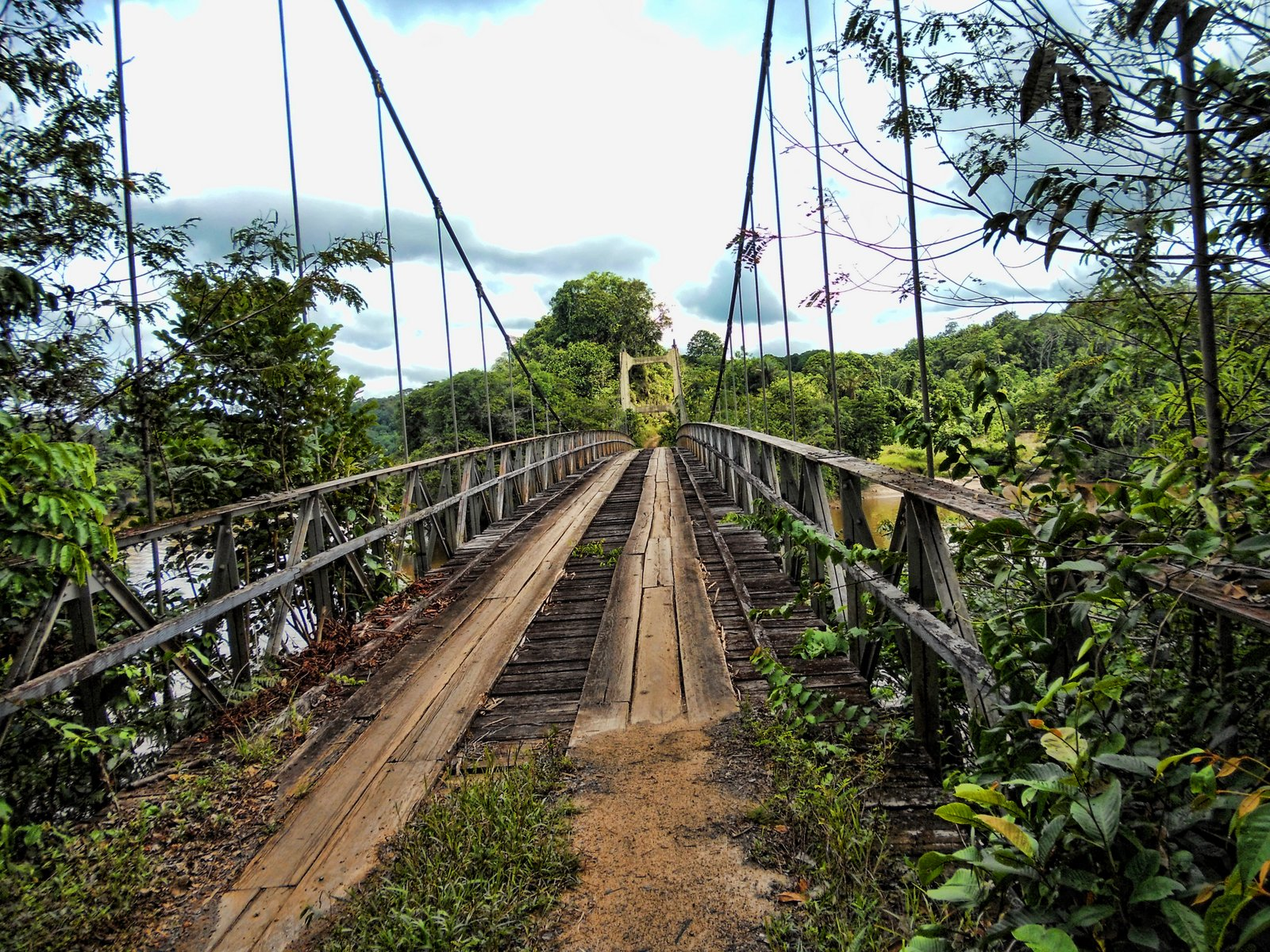 Denham Bridge Potaro River